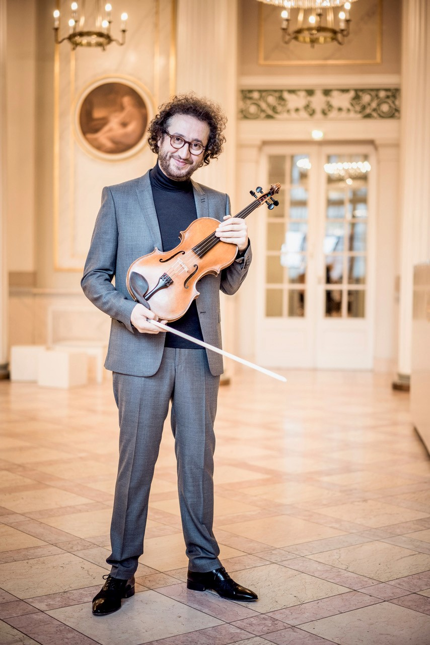 Der Musiker Atilla Aldemir mit seinem Instrument.